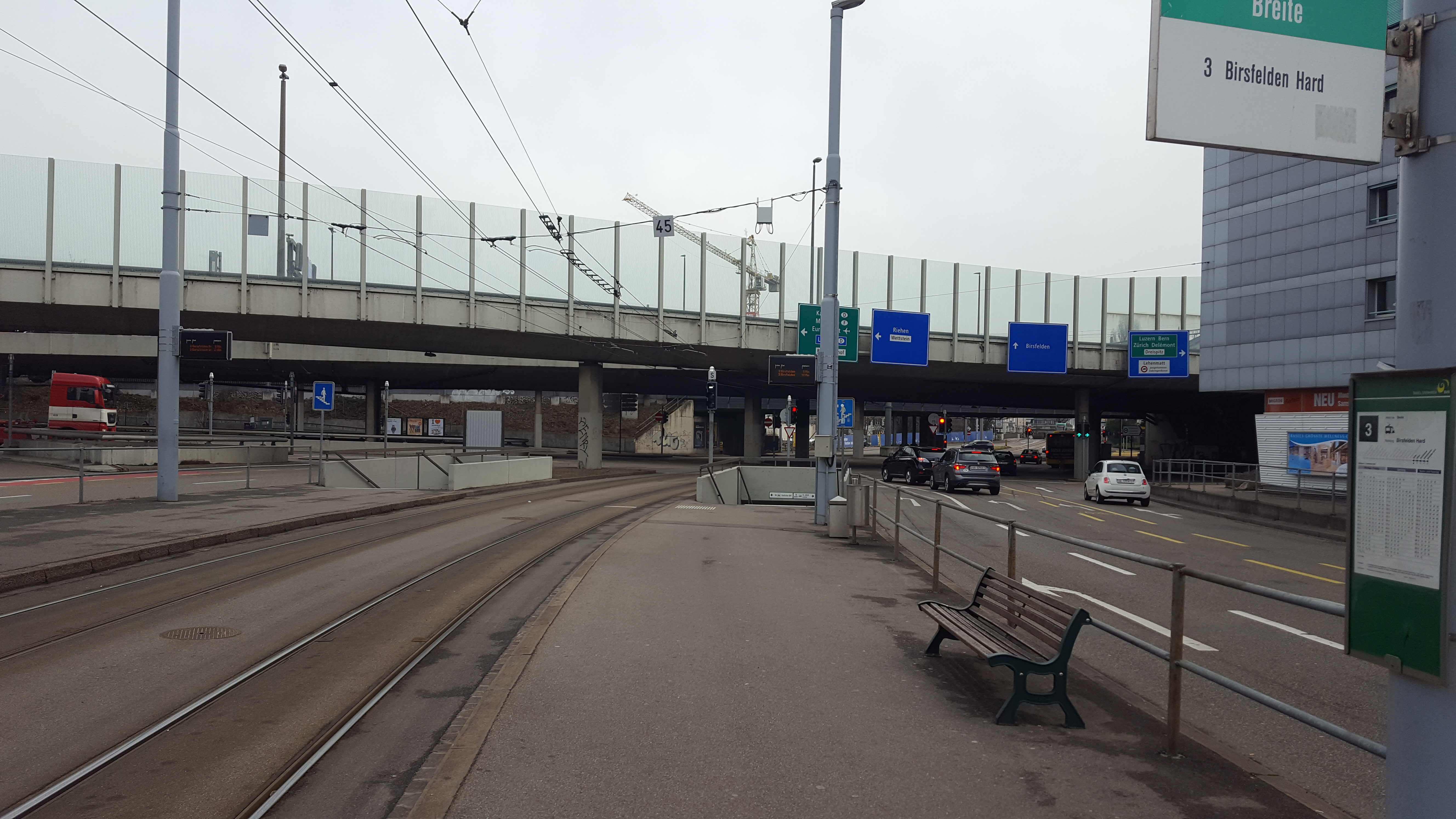 Basel, Tramhaltestelle Breite